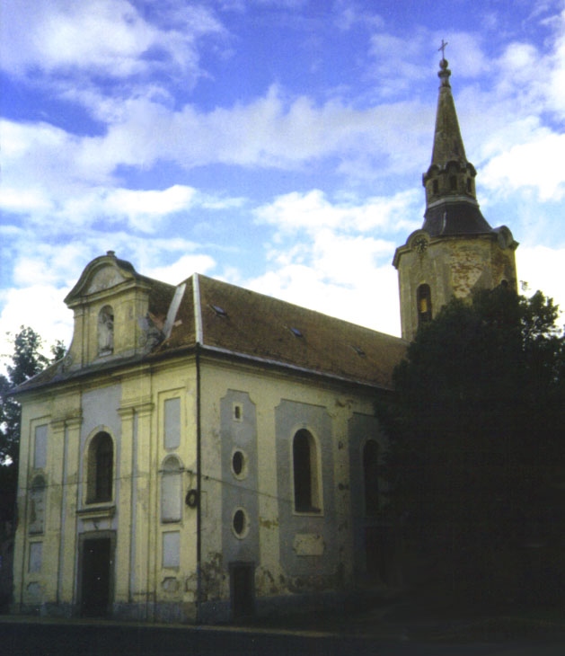 Podvečer u kostela sv. Petra a Pavla v Hroznětíně, okres Karlovy Vary